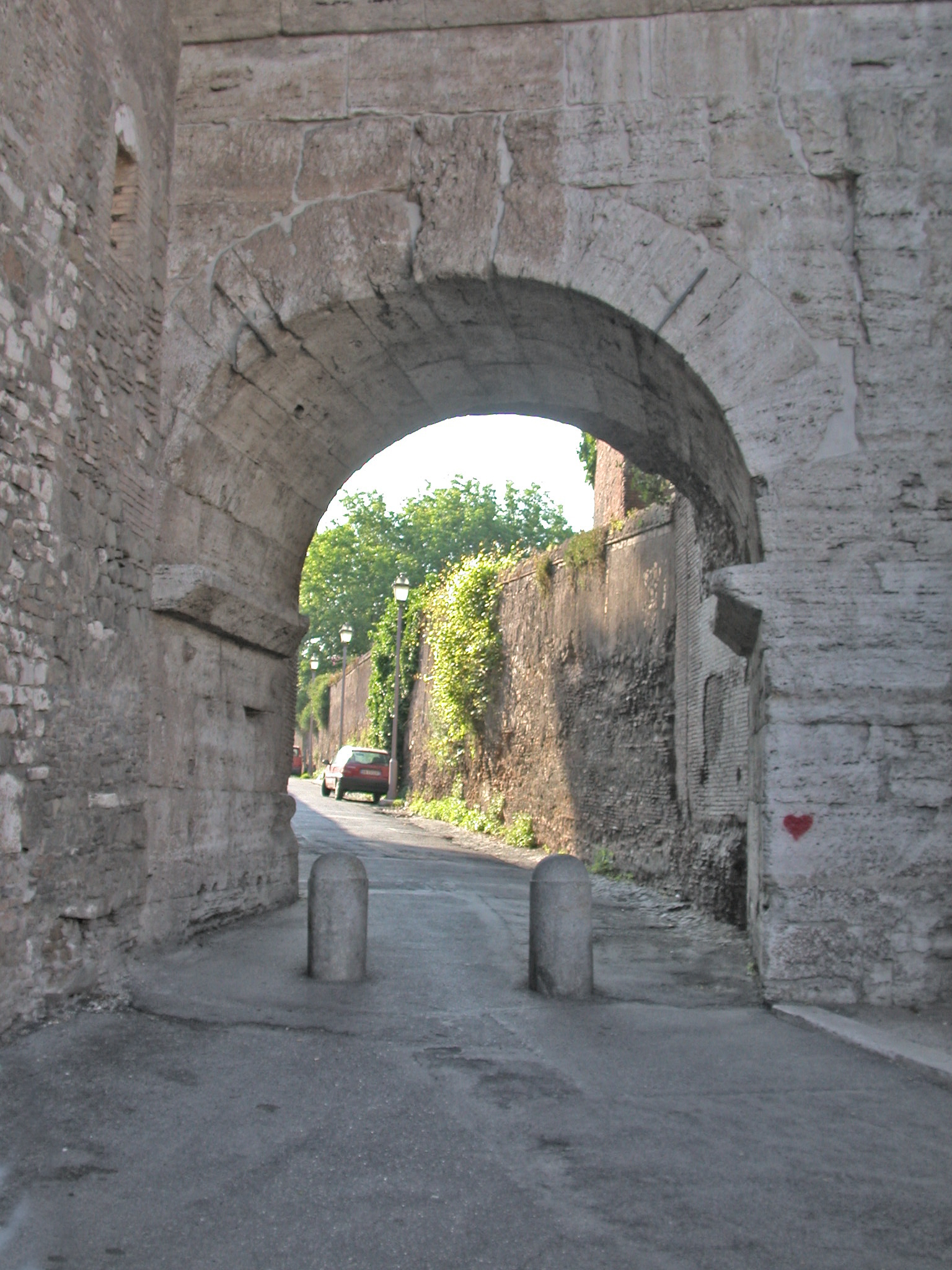 Roma, mura serviane, porta Celimontana (arco di Dolabella e Silano) all'imbocco del Clivus Scauri sul Celio)